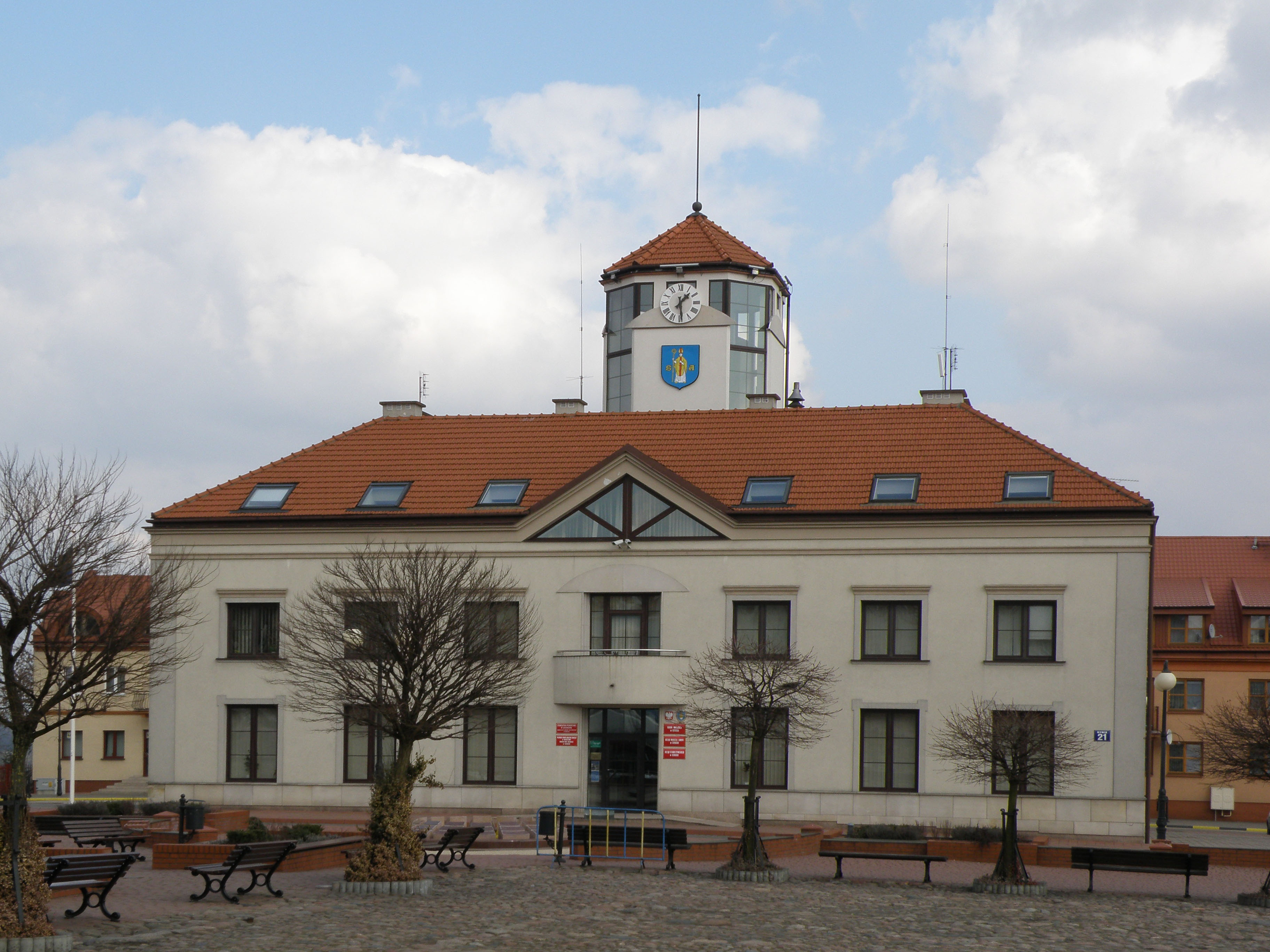 Městský úřad v Serocku; Mazovské vojvodství, Polsko